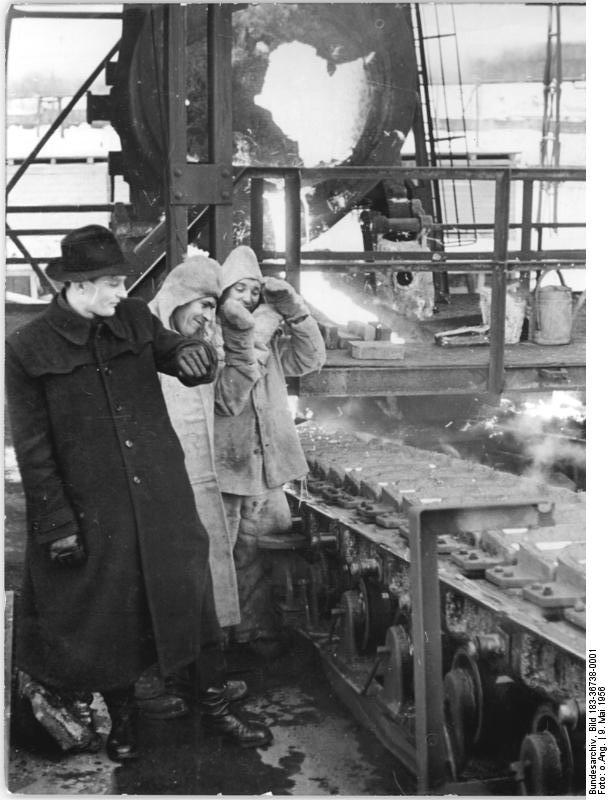 Hüttenarbeiter am Hochofen Zentralbild "Neuer Tage" 9.5.1956 56730 Kollegen des Eisenhüttenkobinates wollen besseres Roheisen liefern. Voller Zuversicht sprechen die Kollegen des Eisenhüttenkombinates "J.W.Stalin" über die grundätzlichen Fragen des Zweiten Fünfjahresplanes und bekunden täglich durch Ihre Arbeit, daß sie mit den neuen Aufgaben einverstanden sind. Als Wichtigstes sehen sie die Mechanisierung und Automatisierung ihre Betriebes an, um der gestellen Forderung, die Selbstkosten um 20% zu senken, gerecht zu werden. So wollen sie die Qualität des Roheisens durch Mischen und Umgiesen verbessern und Verluste möglichst ausschalten. Die alte ARbeitsweise, d.h. das Schlemmen der Kokillen durch Kalkmilch, wird von den Kollegen des Bereiches Masselgiessmaschine durch Einführung einer neuen Schlichte, die aus Giessereigrafit besteht, ersetzt. Versuche an zwei Masselgiessmaschinen haben ergeben, daß durch diese neue Kokillenschlichte und Veränderung der Bandkühlung die Masselqualität bei sparsamstem Verbrauch von Grafit verbessert werden kann. Die bisher üblichen Qualitätsmängel wie Zunderschicht, Gaseinschuss und Blasenbildung in den Roheisenmasseln treten nicht mehr auf. Die Kollegen wollen alles daransetzen, die Versuche erfolgreich zu beenden, um im zweiten Fünfjahrplan billigeres Roheisen bester Qualität an unsere Stahlwerke zu liefern. UBz: Ingenieur SCHREMP ( links ) und die beiden Rinnenleute Horst Simon und Walter Rennefranz überprüfen die Qualität der Roheisenmasseln.